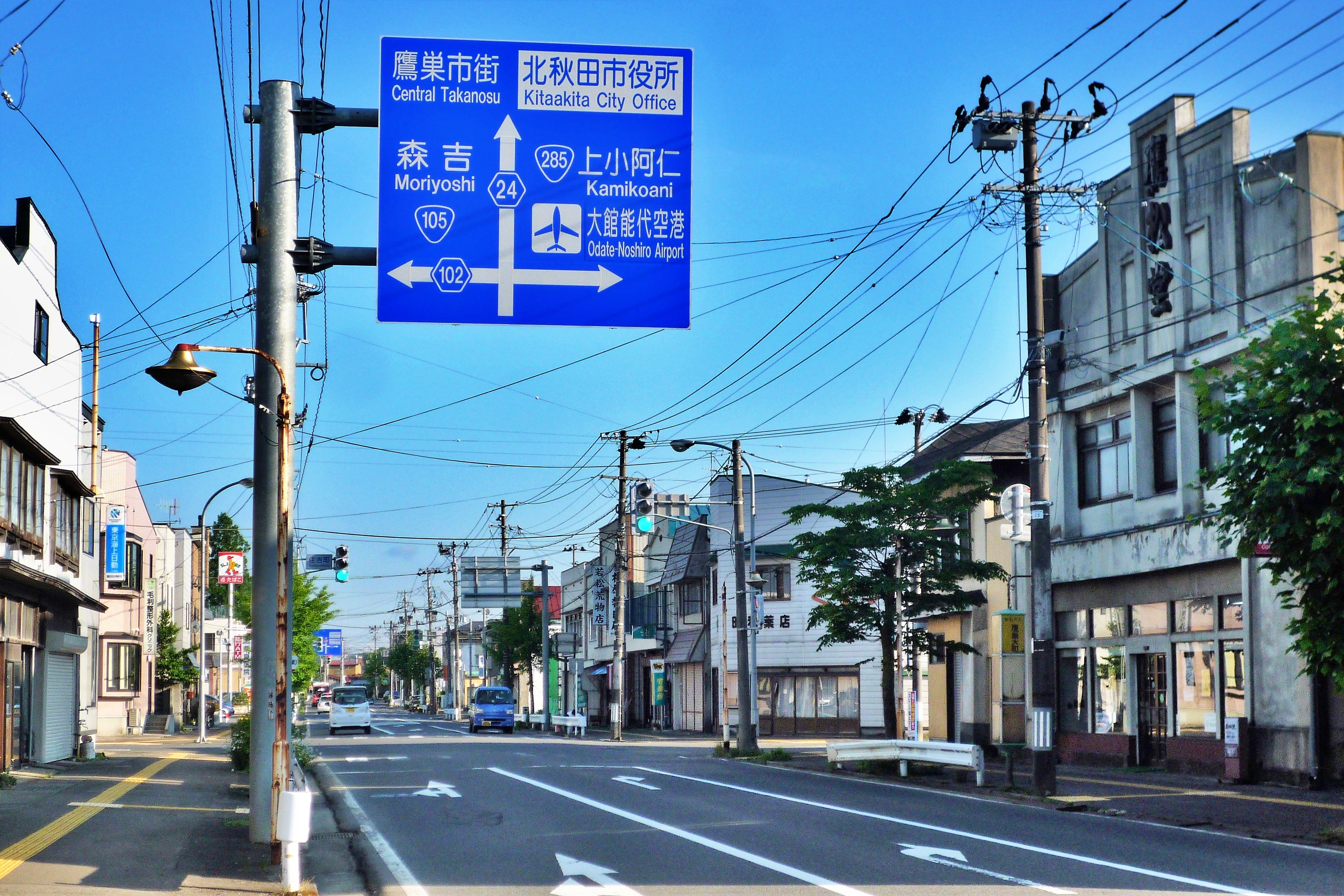 秋田県道24号 鷹巣川井堂川線 - 住吉町交差点（秋田県北秋田市）